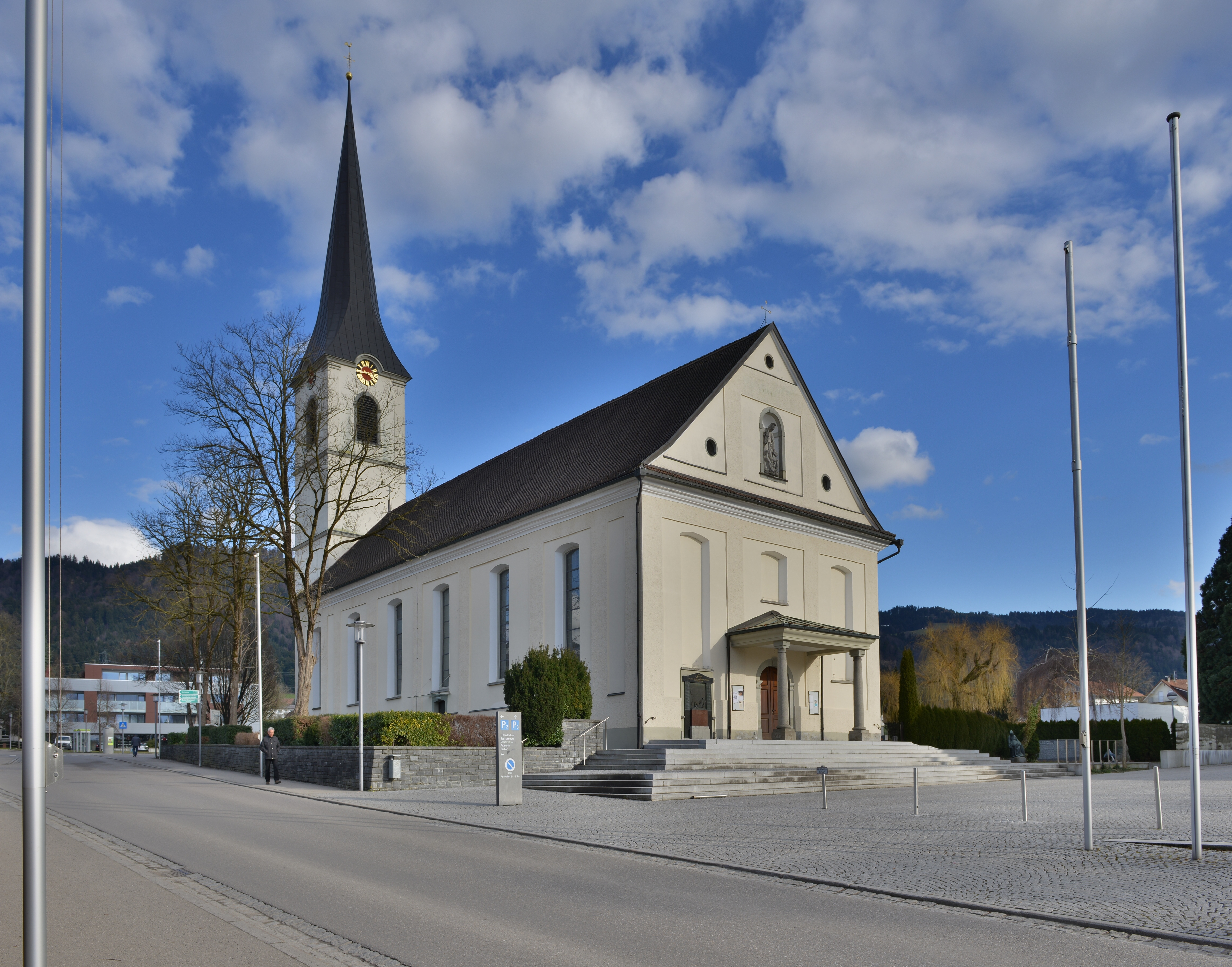 Pfarrkirche hl. Martin in Hörbranz. Kreuzwegstationen in der Apsis von Hubert Fessler 1954; Glasmalereien von der K. Bayerischen Hofglasmalerei F.X. Zettler, München 1895.